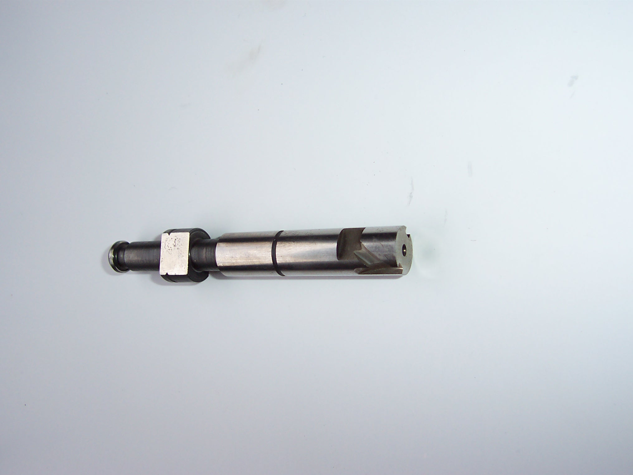 Inline diesel injection pump element plunger